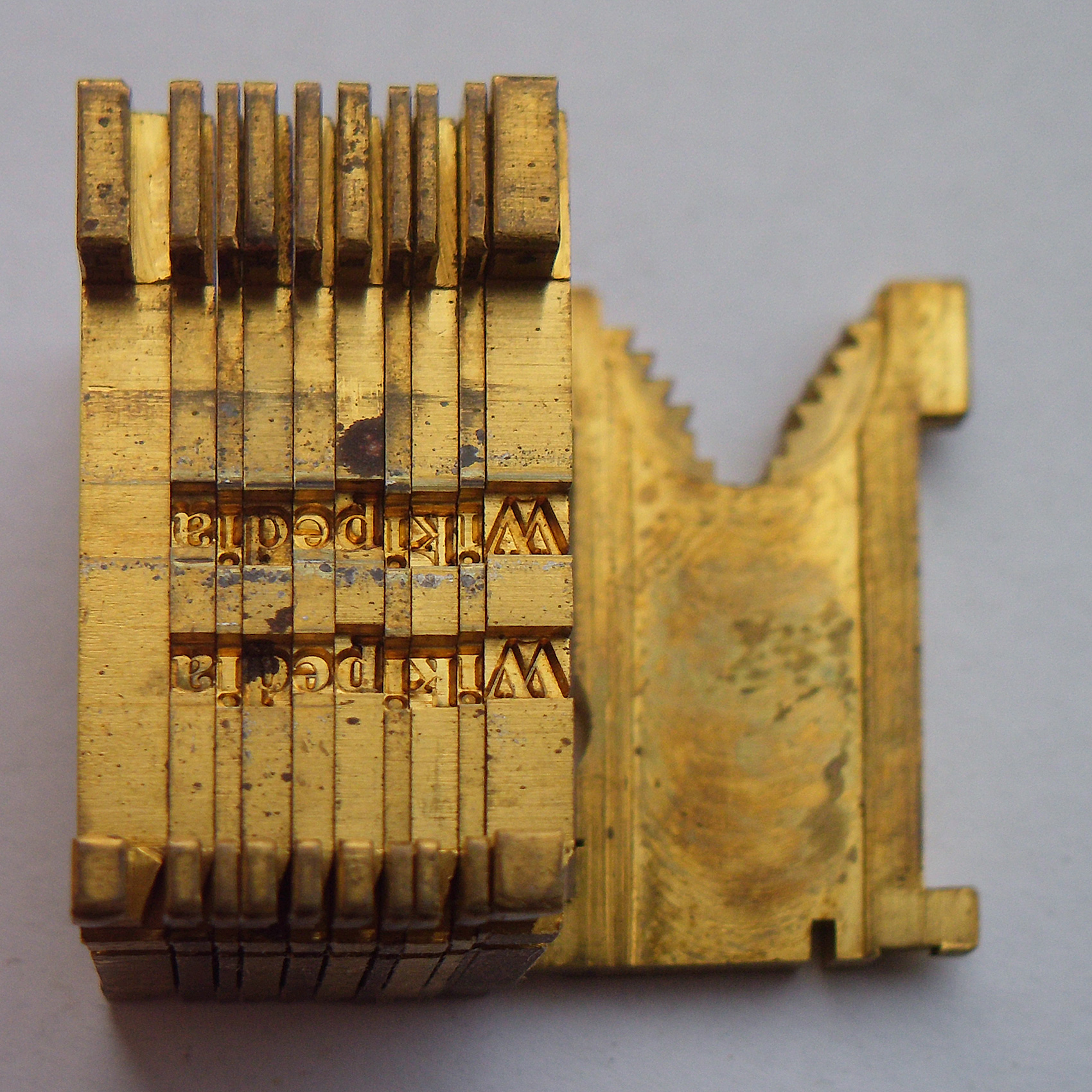 Linotype-Matrix, Guss-Seite